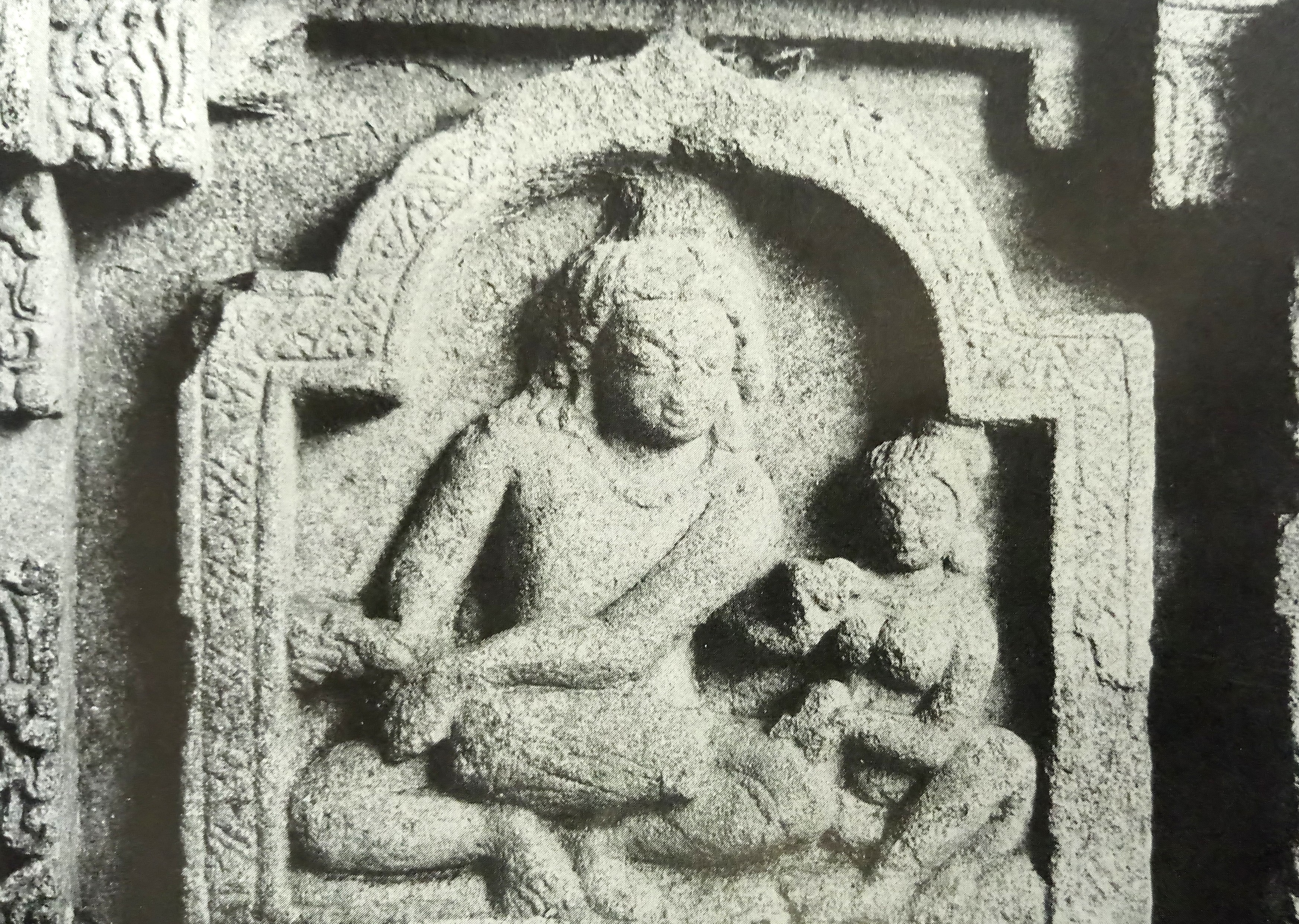 Mridangam carving from Trmple in Bihar, India मृदुंग